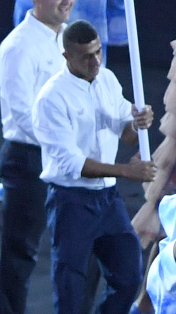 Rio de Janeiro - Cerimônia de abertura dos Jogos Paralímpicos Rio 2016 no Estádio do Maracanã